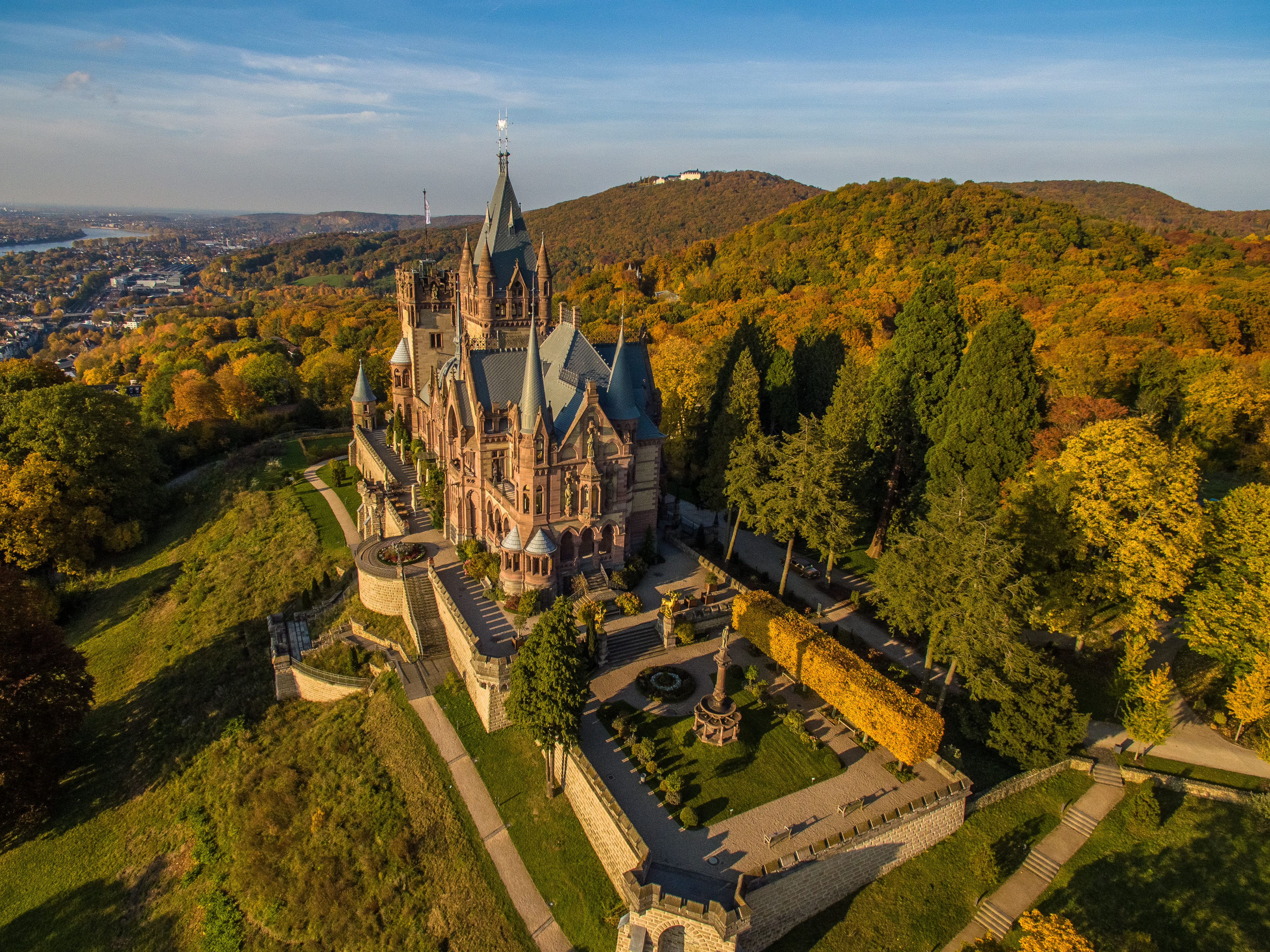 Schloss Drachenburg in Königswinter